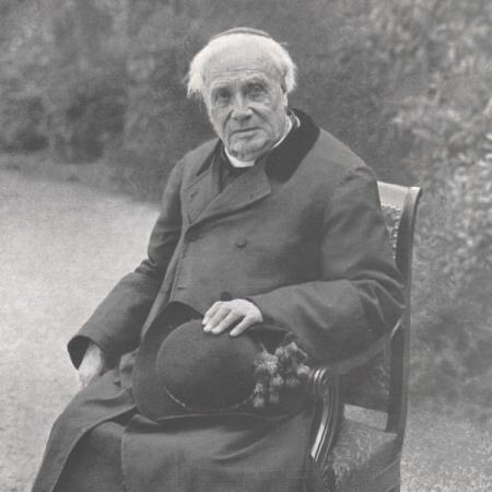 Le cardinal Luçon dans les jardins de l'archevêché à Reims en 1930, photographie de L'Illustration.